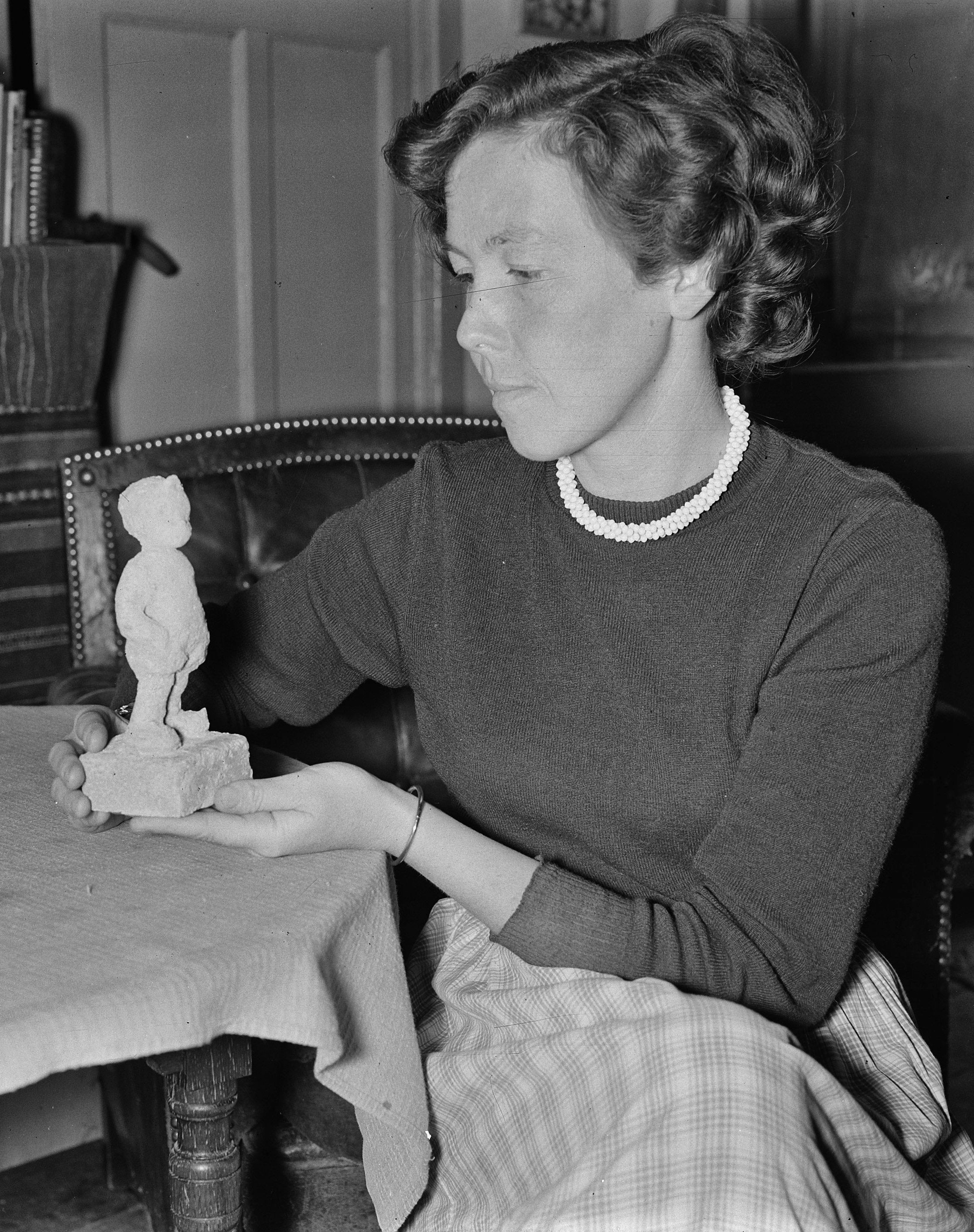 Mejuffrouw Berkhout met beeldje "Bartje"